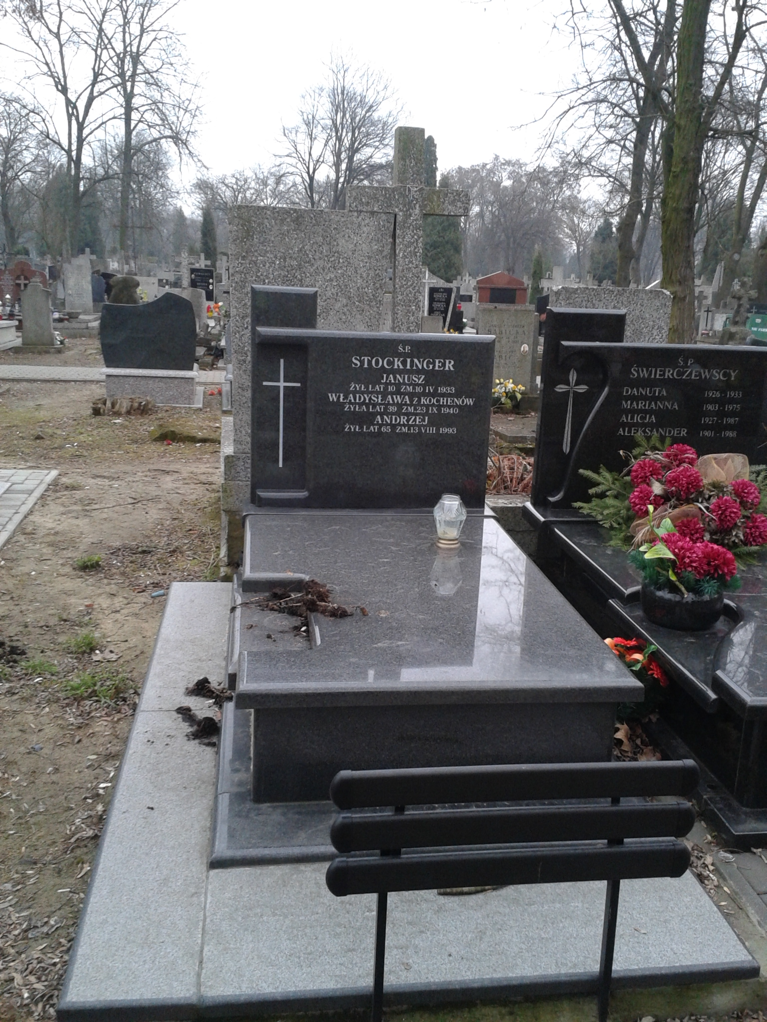 Grób aktora Andrzeja Stockingera na Cmentarzu Bródnowskim